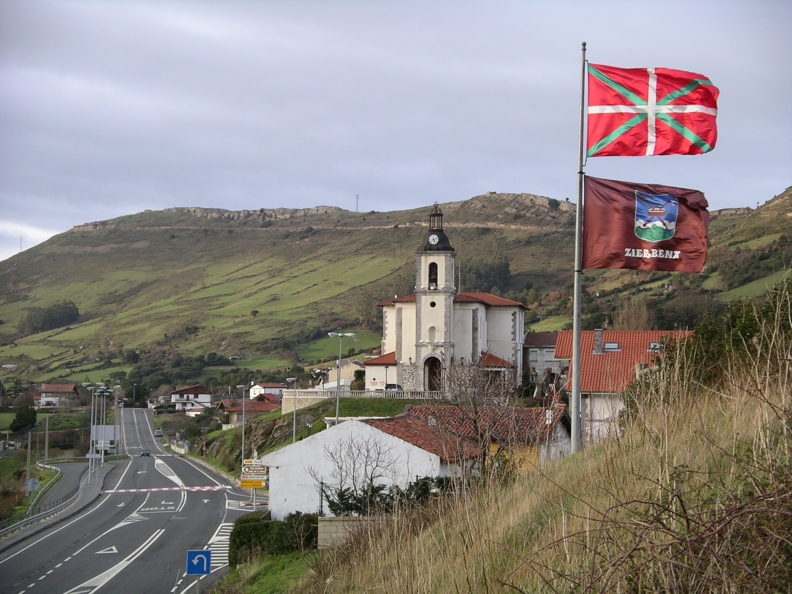 Zierbenako Aldapa auzoa, San Roman eliza eta atzean Luzero mendia.